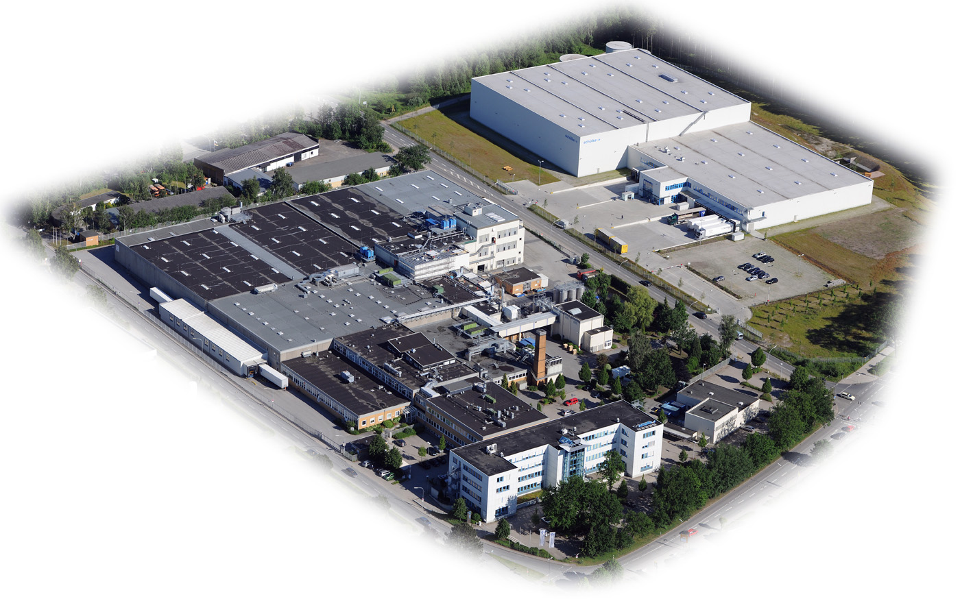 Luftbild Schülke & Mayr Werk + Logistikzentrum. Die weißen Gebäude in der rechten Bildhälfte sind das 2009 neu erbaute Logistikzentrum.